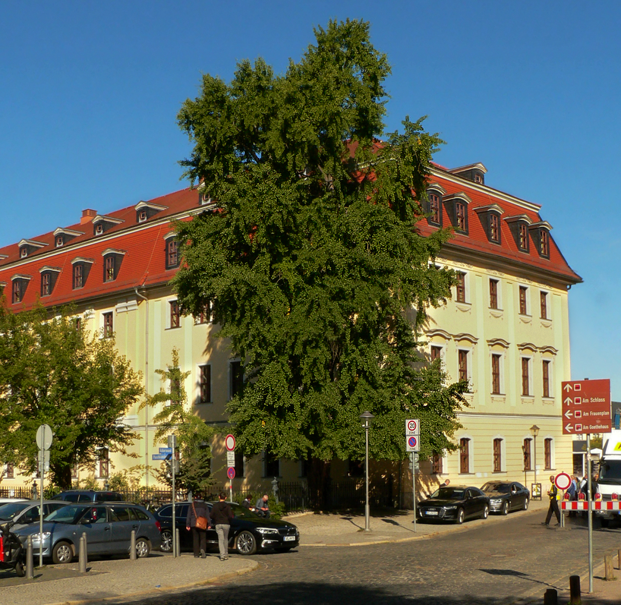 Ginkgo biloba, den Goethe um 1815 durch seinen Hofgärtner Johann Conrad Sckell am Fürstenhaus Weimar pflanzen ließ.